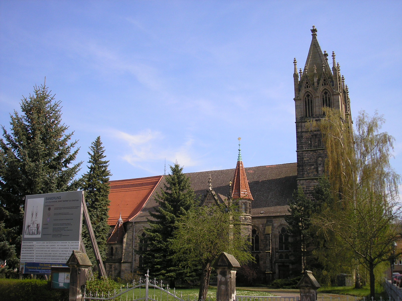 Die Stadtkirche St. Marien von Stadtilm (Thüringen).